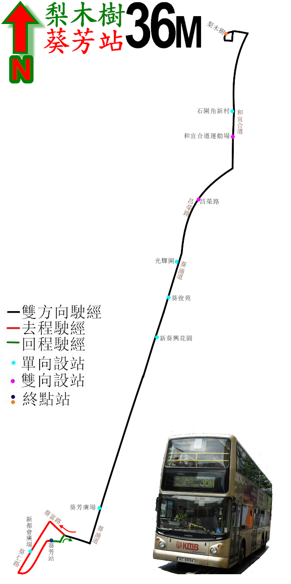 中文（香港）: 九巴36M線的走線圖